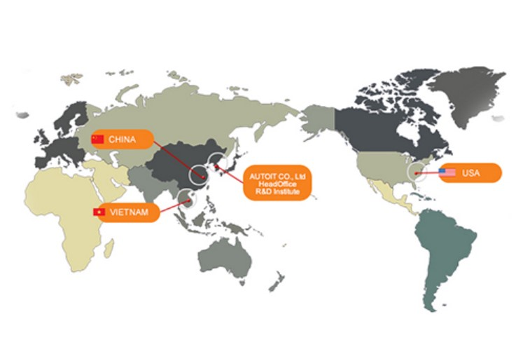 오토아이티 해외 사업장